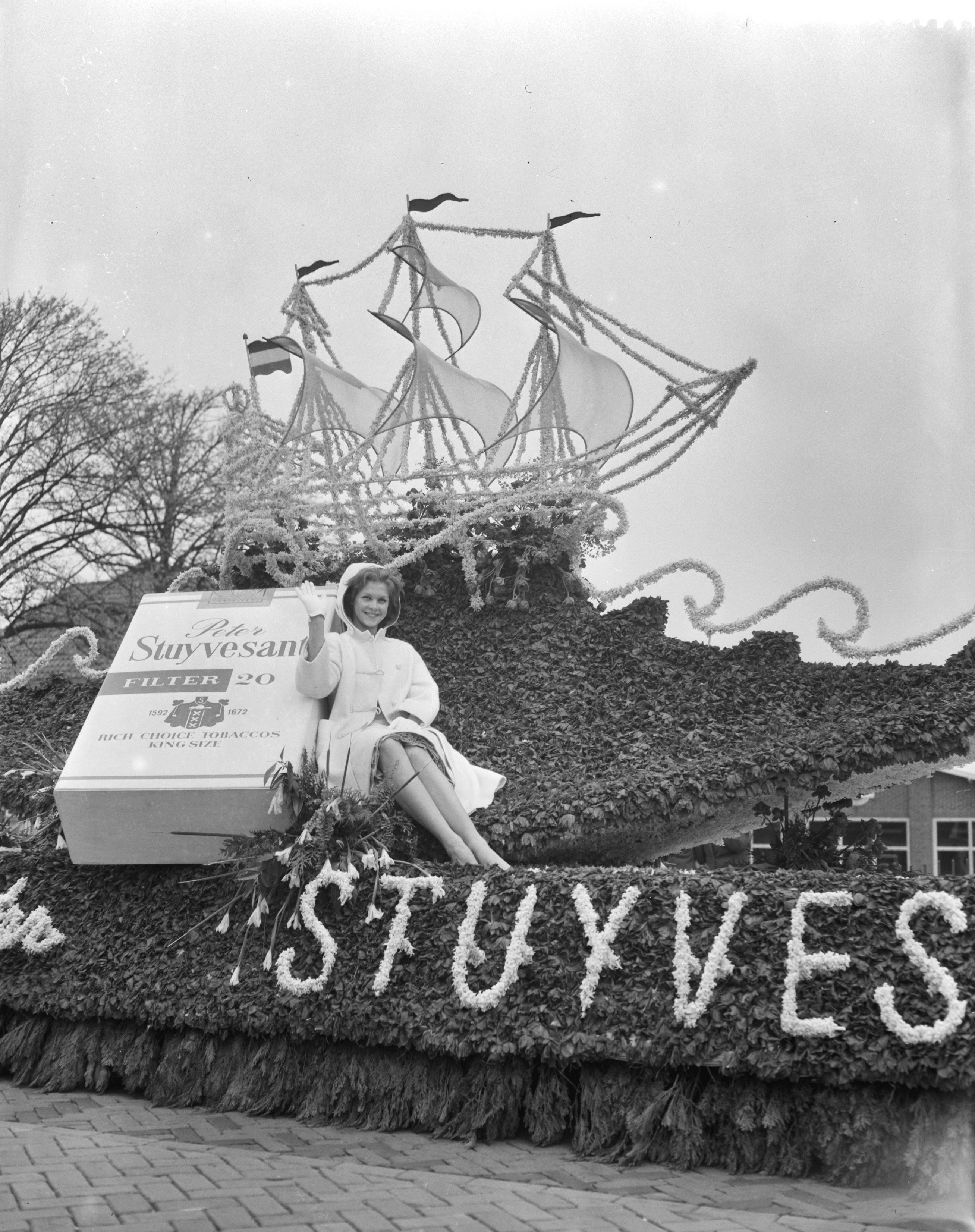 Collectie / Archief : Fotocollectie Anefo Reportage / Serie : [ onbekend ] Beschrijving : Jaarlijkse bloemencorso in de bollenstreek Datum : 25 april 1959 Fotograaf : Rossem, Wim van / Anefo Auteursrechthebbende : Nationaal Archief Materiaalsoort : Negatief (zwart/wit) Nummer archiefinventaris : bekijk toegang 2.24.01.04 Bestanddeelnummer : 910-3217